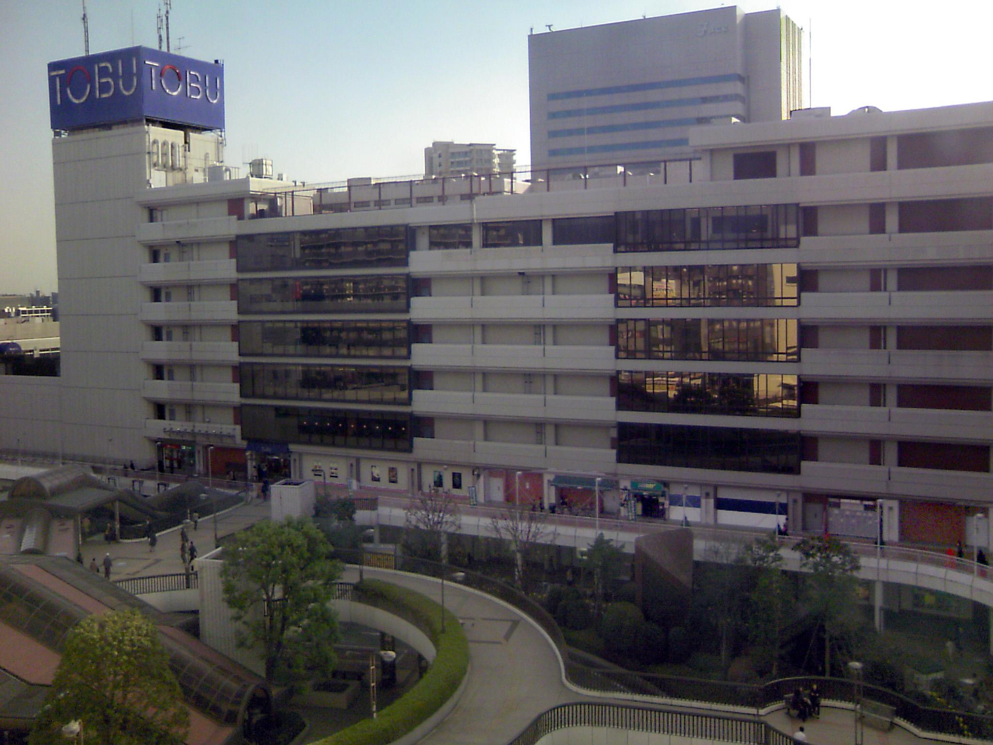 船橋駅東武百貨店